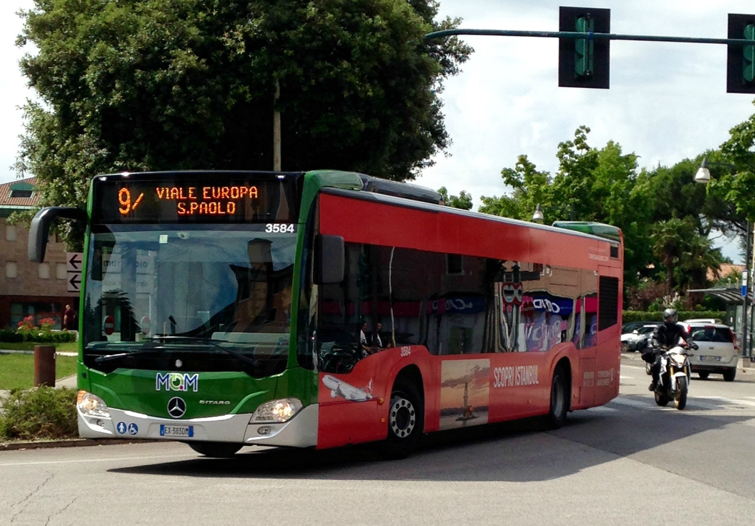 Autobus 3584 Pellicolato Mercedes Benz Citaro Euro 6 di MOM Mobilità di Marca (ex ACTT) di Treviso, in servizio come Linea 9/ a Preganziol, diretto verso Viale Europa / San Paolo